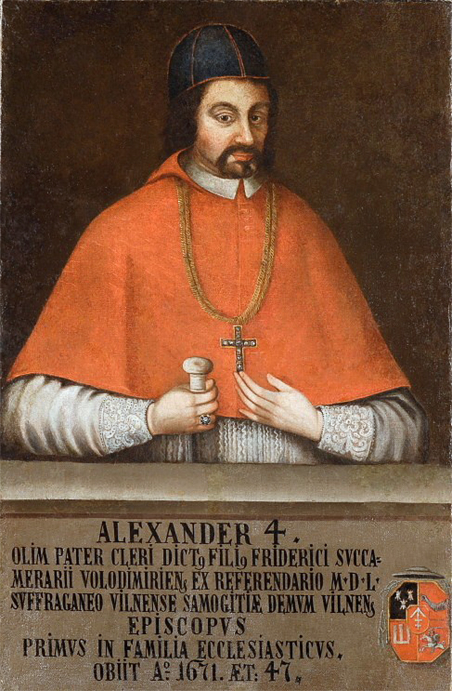 Беларуская (тарашкевіца): Партрэт Аляксандра Казімера Сапегі (Alaksandar Kazimier Sapieha) гербу «Ліс» (1624—1671), рымска-каталіцкага і дзяржаўнага дзеяча Вялікага Княства Літоўскага, рэфэрэндара вялікага літоўскага, біскупа жамойцкага і віленскага.